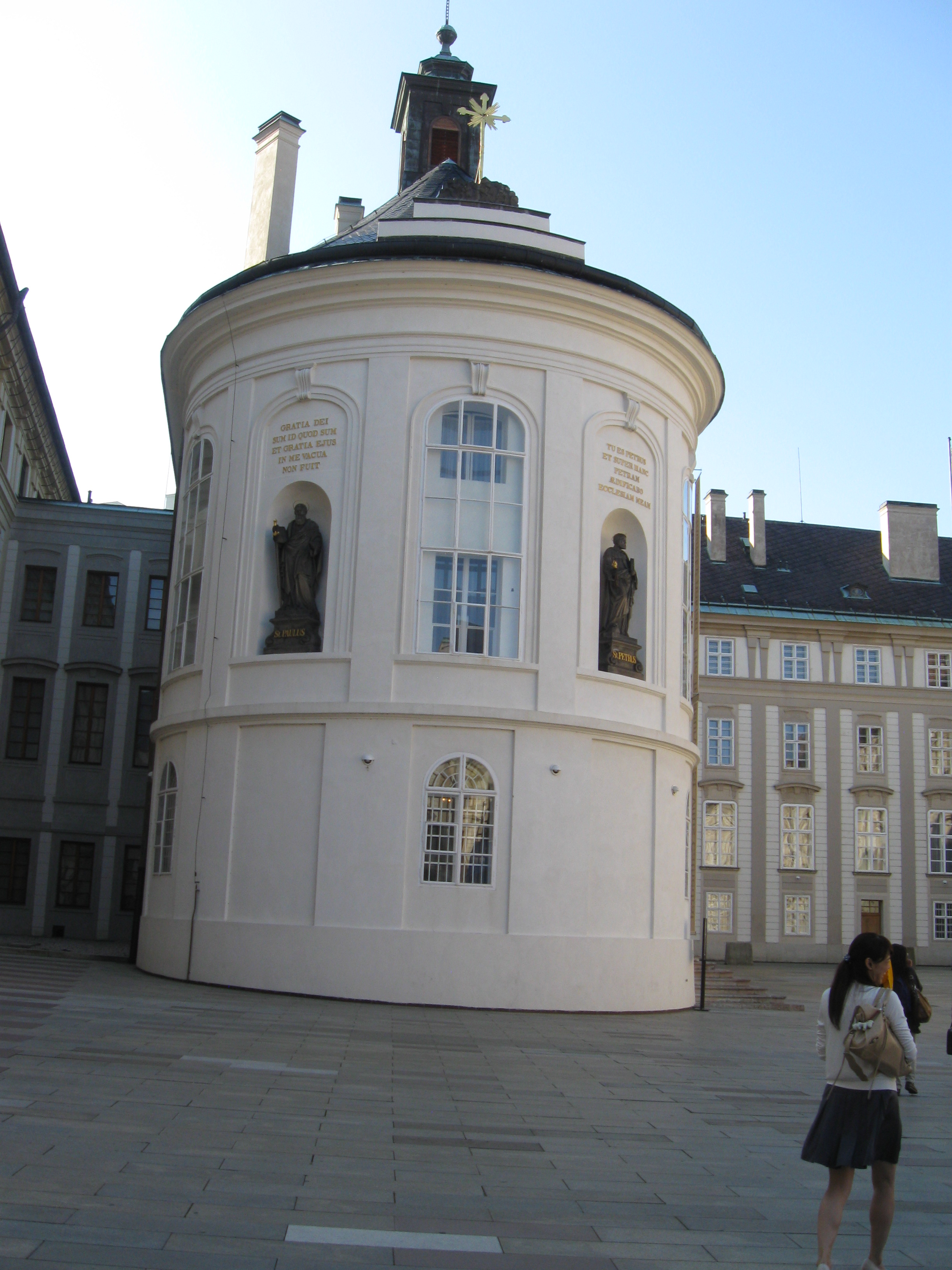 Pražský hrad, Praha 1-Hradčany